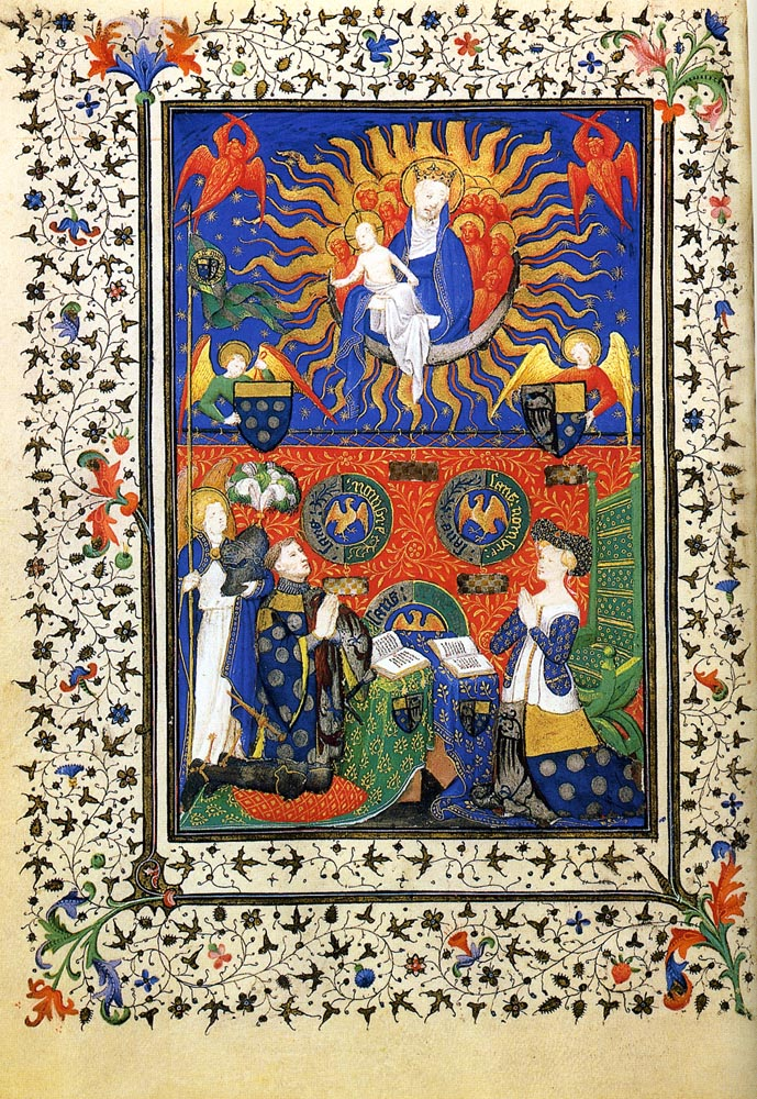 Boucicaut Hours. f. 26v